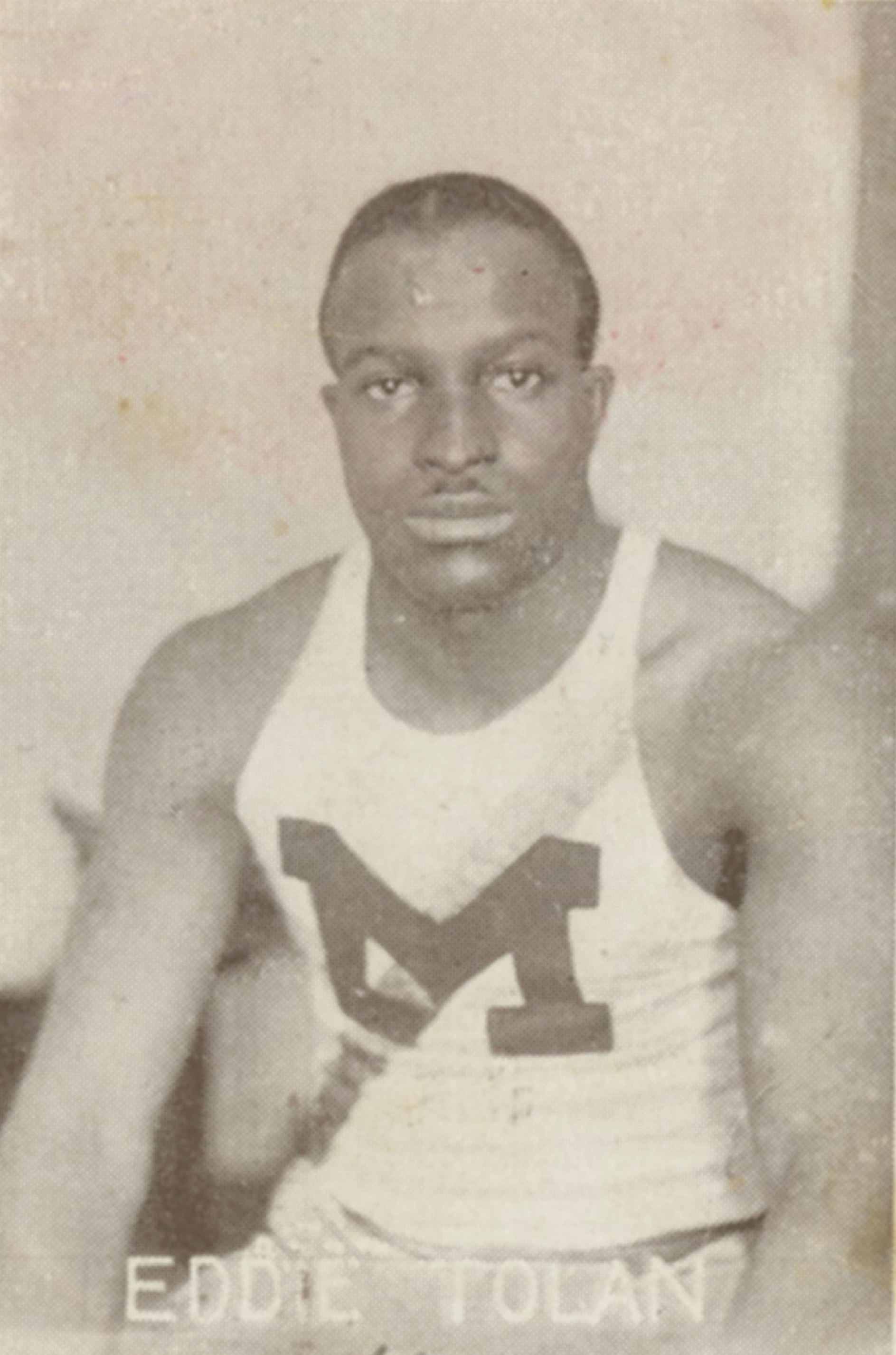 Format: Samlekort Dato / Date: ca. 1930 (dokumentet) Fotograf / Photographer: Ukjent Wikipedia: Eddie Tolan (1908 - 1967) Eier / Owner Institution: Trondheim byarkiv, The Municipal Archives of Trondheim Arkivreferanse / Archive reference: Sportsklubben Freidig: Sigarettfoto ca. 1930 (Løpenr. 75) F23913 Tekst på baksiden: Eddie Tolan satte ved det store sprintermøte i Los Angeles i juni 1930 verdensrekord over 100 meter med 10.2. Tolan gjestet Norge ifjor og tangerte da rekorden. Da verdensrekorden sattes, slo Tolan også den dobbelte olympiamester kanadieren Williams. Merknad: Disse samlekortene med bilder av norske og internasjonale idretthelter fulgte med i sigarettpakker på 1920 og 30-tallet - derav tobakksreklamen på baksiden. Samlekortene kommer fra Sportsklubben Freidigs arkiv, og inneholder nærmere 90 unike kort pent plassert i et samlealbum. Samleren var den senere skipsmegler Finn Følling (1914 – 1985).